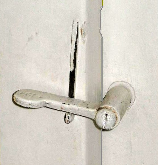 mit Vorreiber verschlossenes Fenster über einem Streifdraht